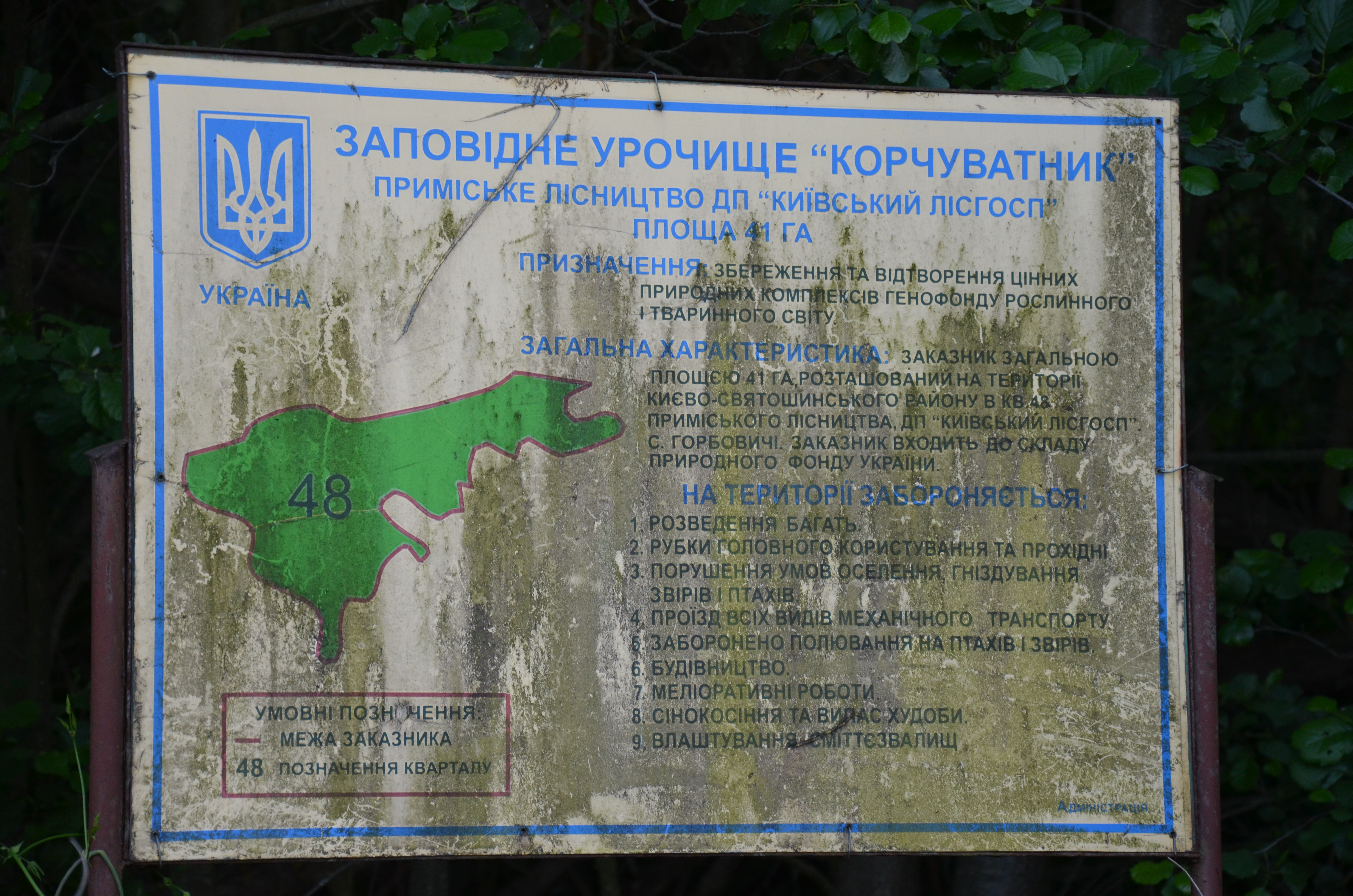 «Корчуватник», Києво-Святошинський район, Шпитьківська сільська рада